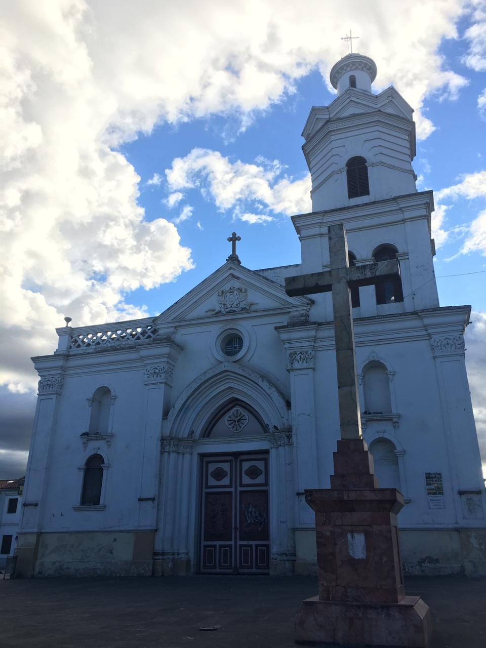 Iglesia de San Sebastian ( Parroquia de San Sebastian), fachada frontal (Cuenca-Ecuador)